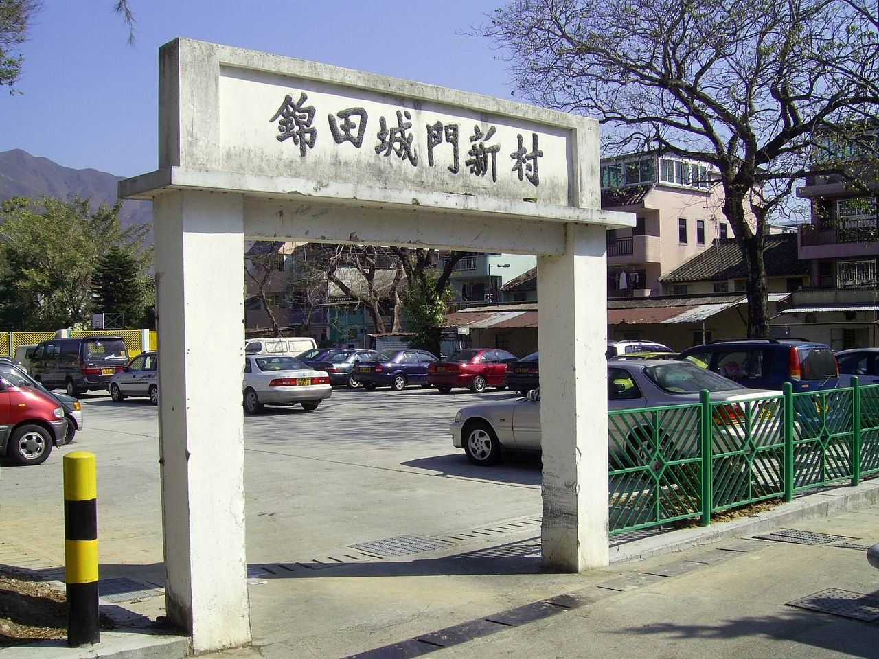 中文（香港）: 城門新村